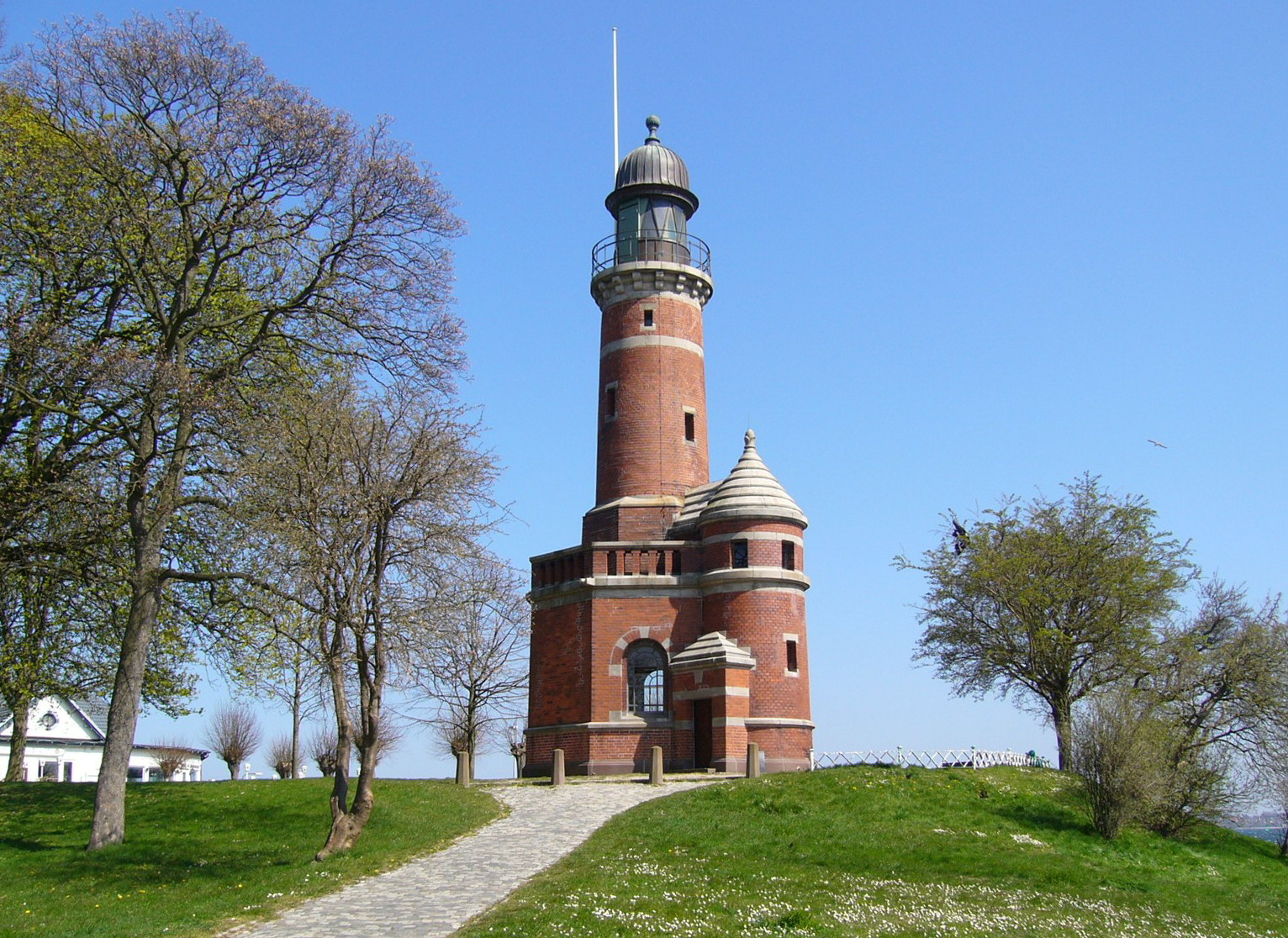 Leuchtturm in Kiel-Holtenau. Er markiert die Einfahrt zum Nord-Ostsee-Kanal. In Betrieb seit 1895. Im achteckigen Unterbau erinnert eine Tafel mit der Inschrift: "Kaiser Wilhelm II. vollzog die Weihe des Nord-Ostsee-Kanals und übergab ihn dem Weltverkehr am 21. Juni 1895" an die Kanaleröffnung, siehe File:Tafel Leuchtturm Holtenau.jpg.